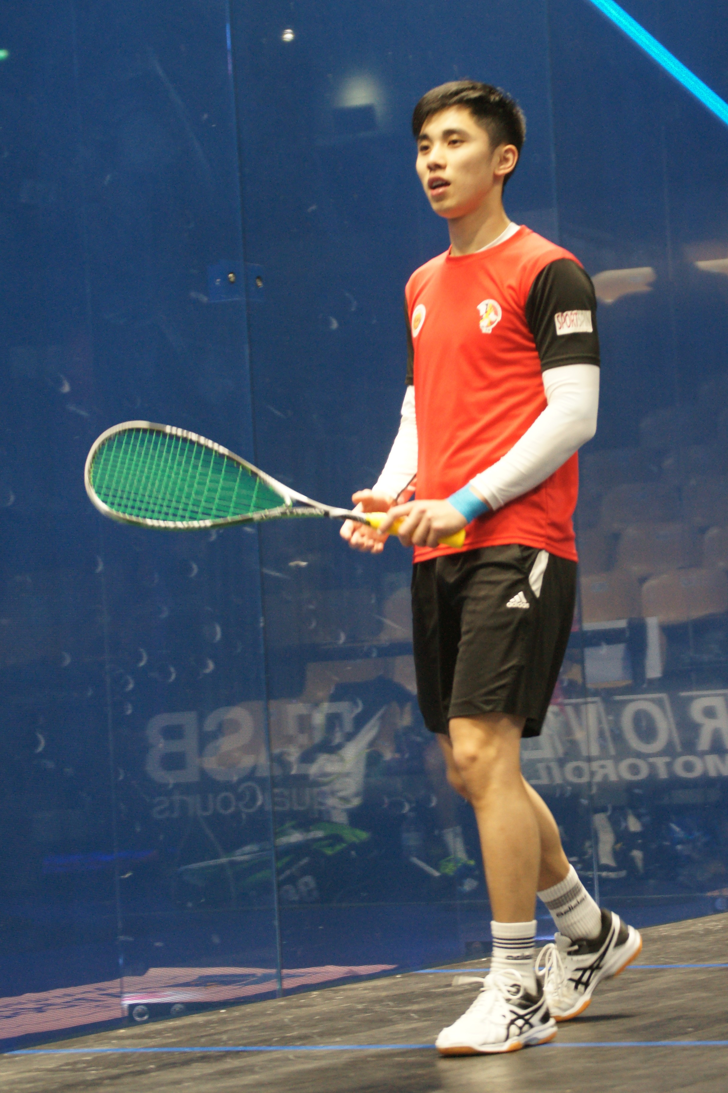 Tang Ming-Hong, championnats du monde de squash par équipe Marseille 2017